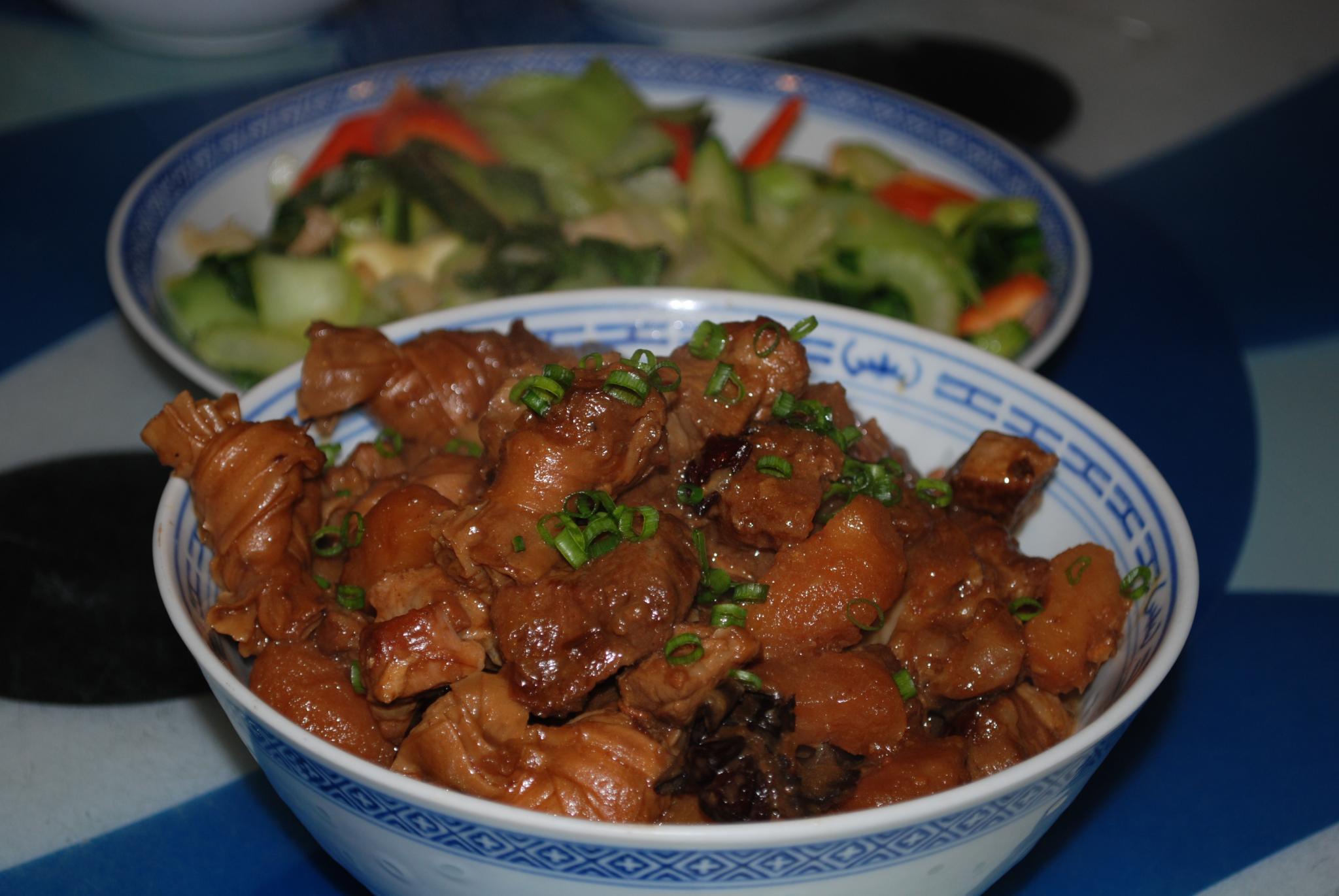 Stufato d'épaule de mouton